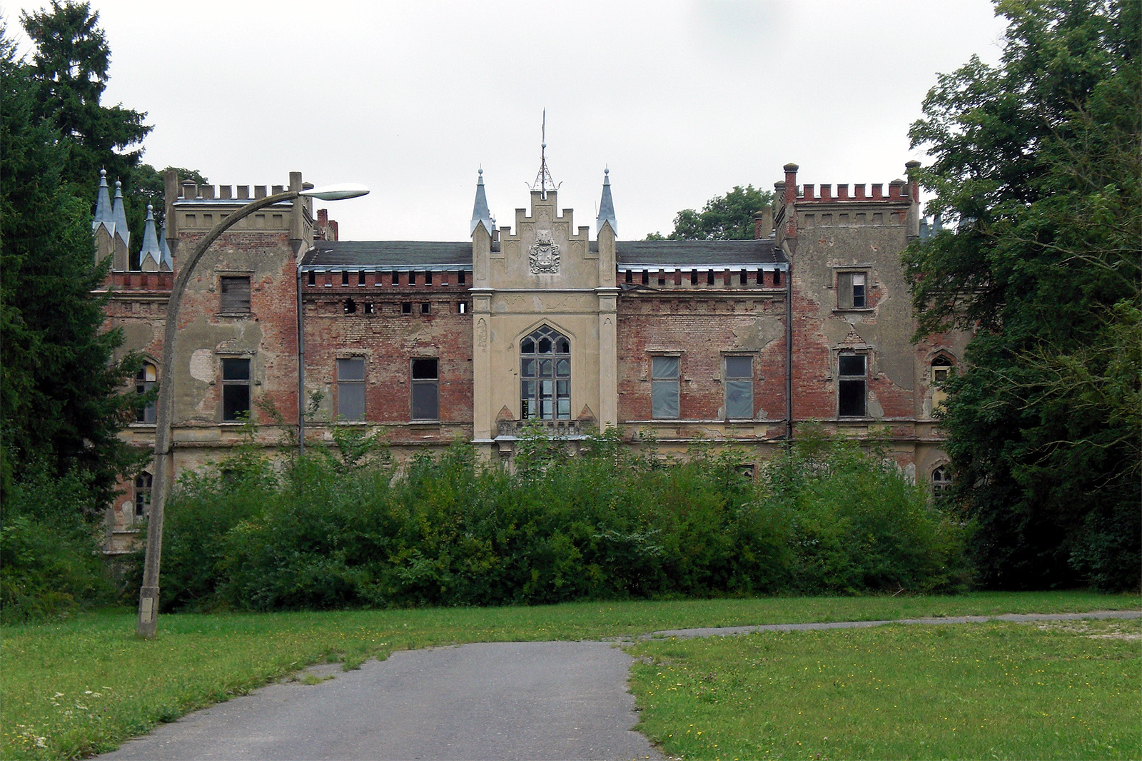 Gutshaus Vogelsang in Lalendorf (Mecklenburg-Vorpommern) Datum: 15.08.2010 Urheber: onnola (Flickr-User) Quelle